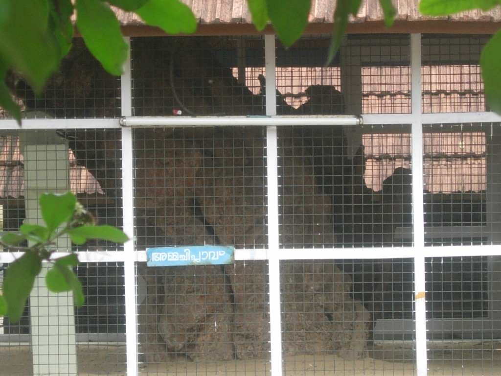 അമ്മച്ചിപ്ലാവ്- മാർത്താണ്ഡ വർമ്മയെ രക്ഷപ്പെടാൻ സഹായിച്ചത് എന്ന് വിശ്വസിക്ക�. ഛായാ: മധു മസ്കറ്റ്; ലിങ്ക്: ലൈസൻസ് ായച്ചു തരുകയോ ഫ്ലിക്കറിൽ കയറ്റി ഫ്രീ ലൈസൻസ് ആക്കുകയോ ചെയ്യാമെന്ന് മധു സമ്മതിച്ചിട്ടുണ്ട്.